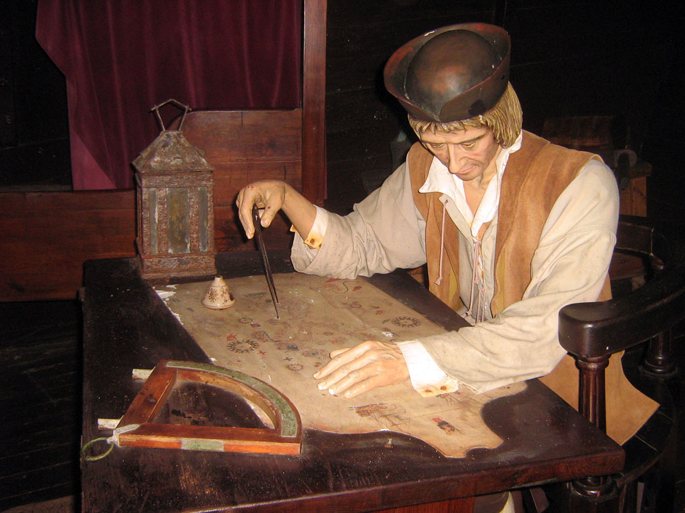 Representación de Cristobal Colón en el Muelle de las Carabelas